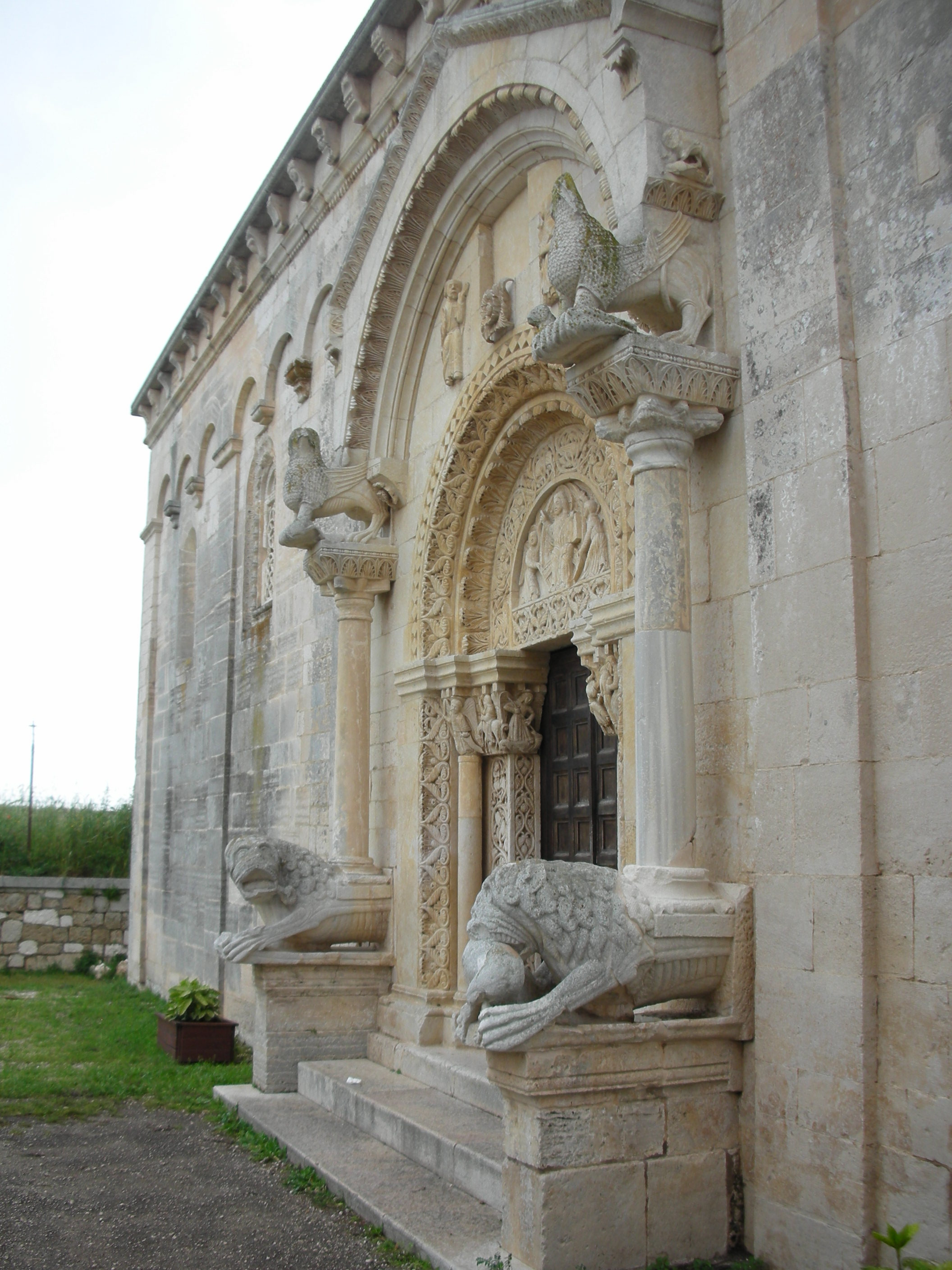 Façade nord de l'abbatiale San Leonardo de Siponto (Pouilles), vue depuis l'ouest